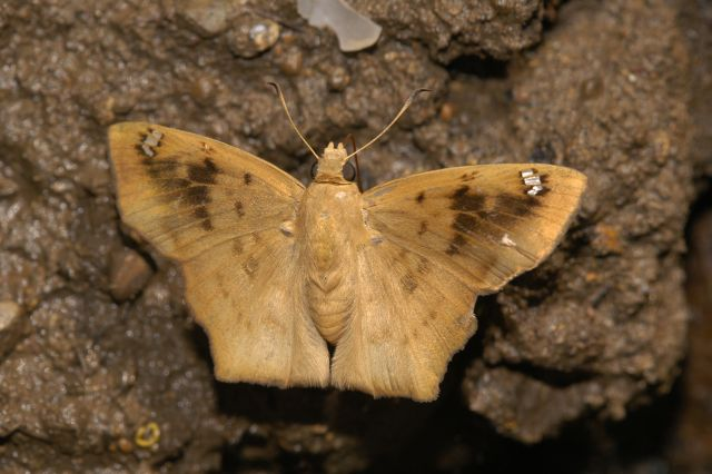 Black Angle , Tapena thwaitesi, DSF at Nagla, Thane - Sanjay Gandhi National Park (India).